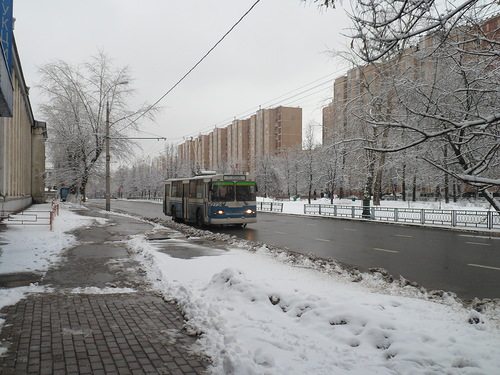 Троллейбус № 77. Москва